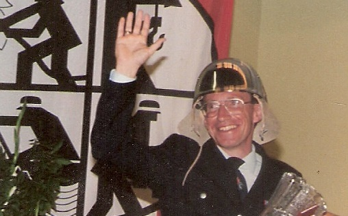 Feuerwehrhelm der DDR als Geschenk bei einem Jubiläumsfest in Hessen im Jahr 1990